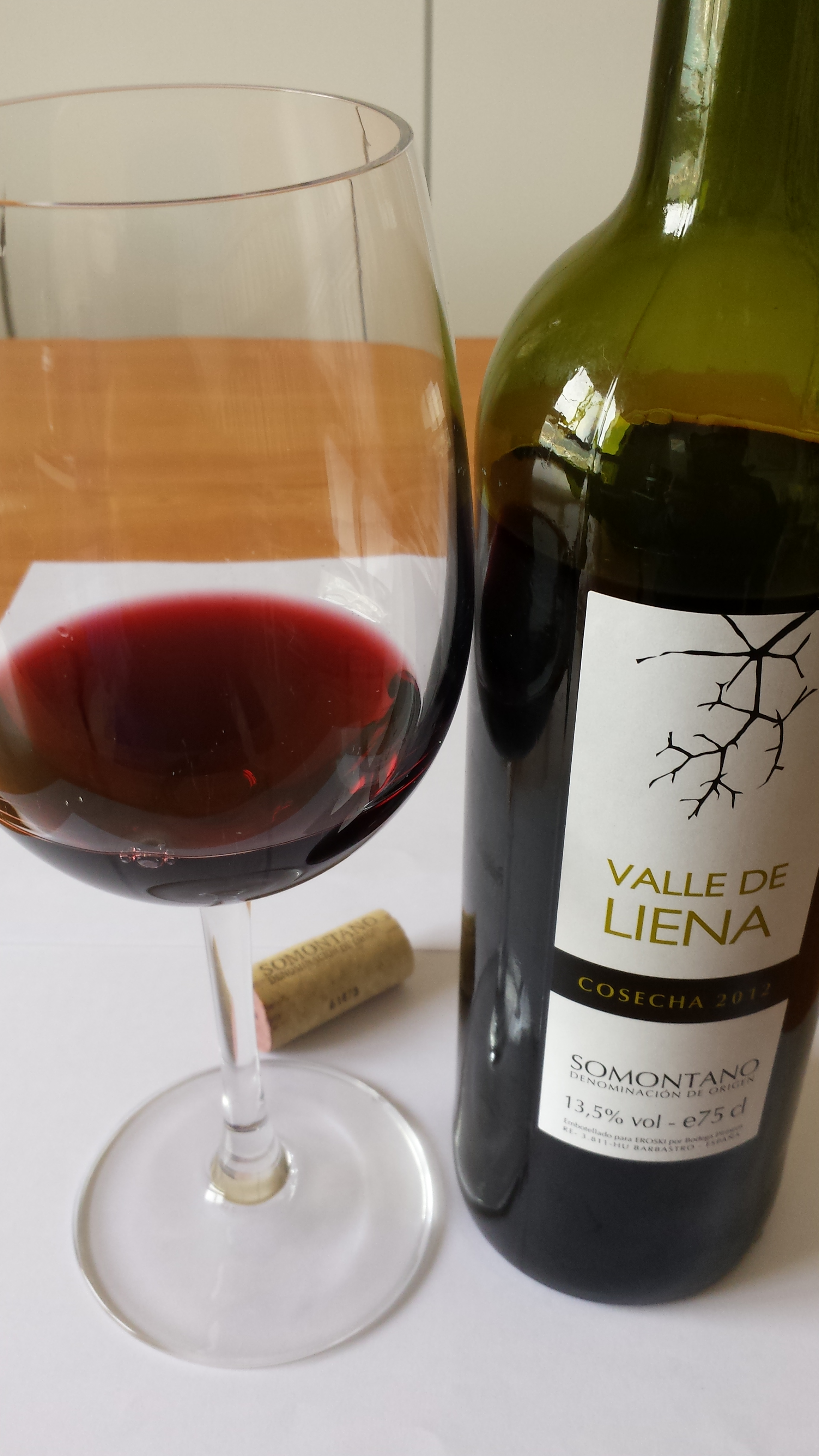 Vino resultado de la fusión de uvas tempranillo, moristel y cabernet sauvignon, Aragon, España